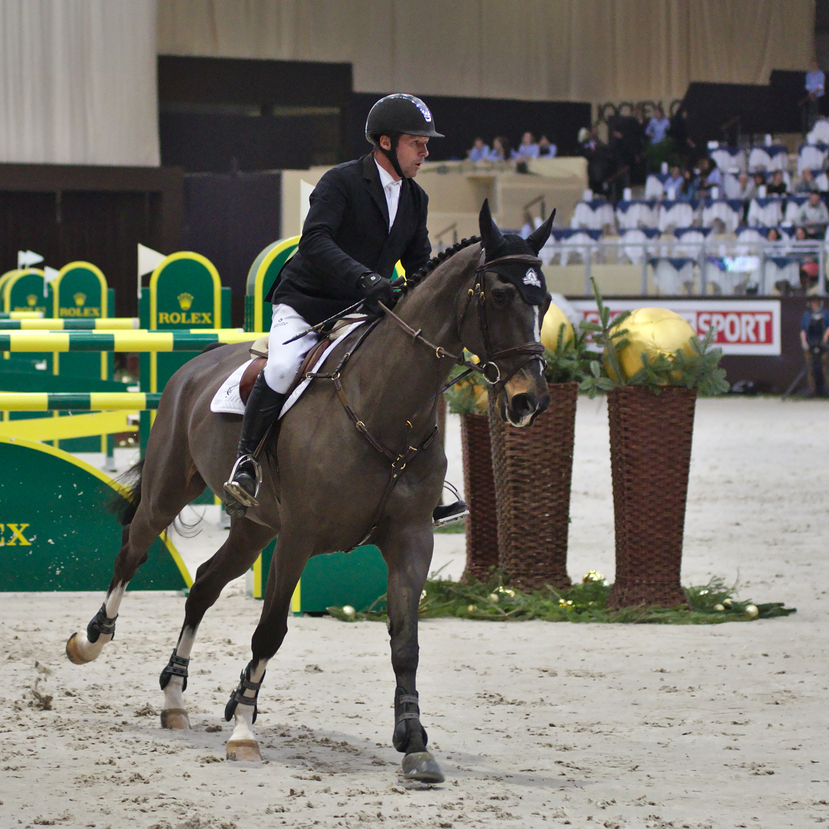 CHI Genève 2013 - 20131214 - Eric Lamaze et Zigali PS